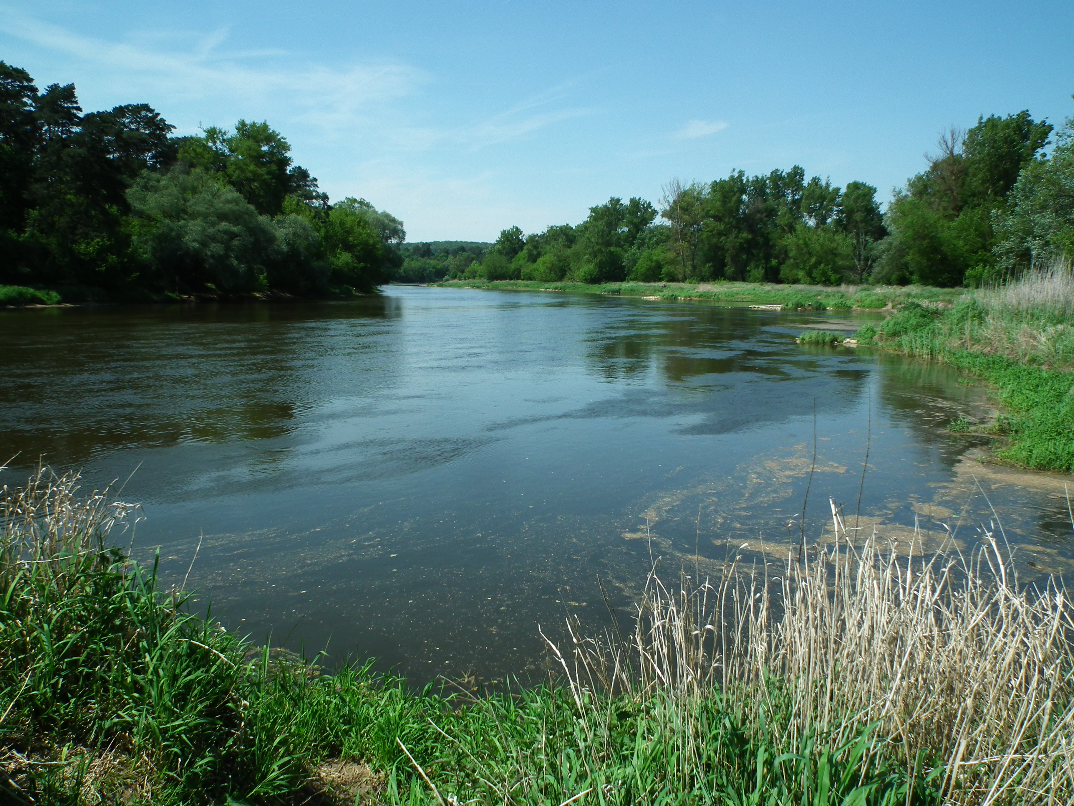 Obszar Natura 2000 Ostoja Rogalińska.